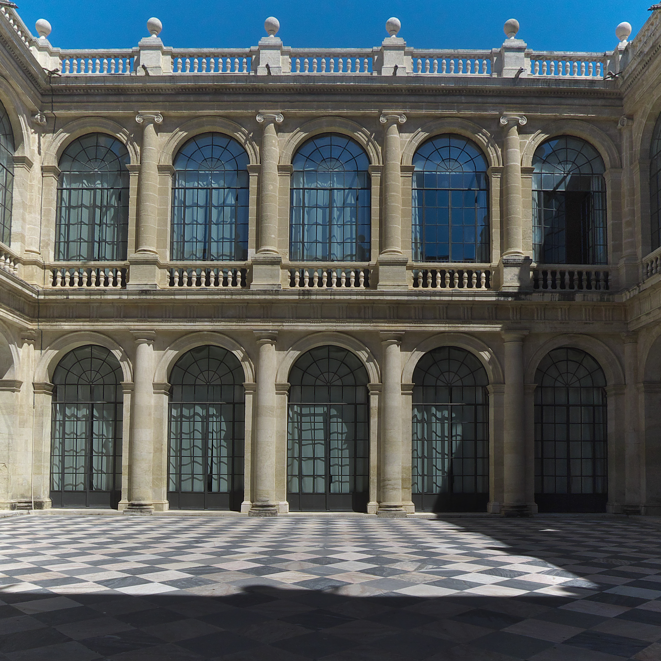 Juan de Herrera presenta a Felipe II su proyecto de la futura Lonja de Sevilla (1572). Juan de Minjares ejecuta las primeras fases de la obra (1582) que terminarían en el año 1646, interviniendo los arquitectos, Alondo de Vandelvira, Miguel de Zumárraga, Lucas Cintora y Aréjula y Pedro Sánchez Falconete.